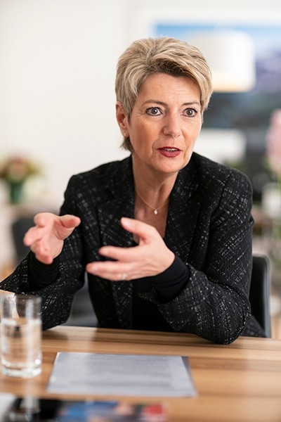 Karin Keller-Sutter